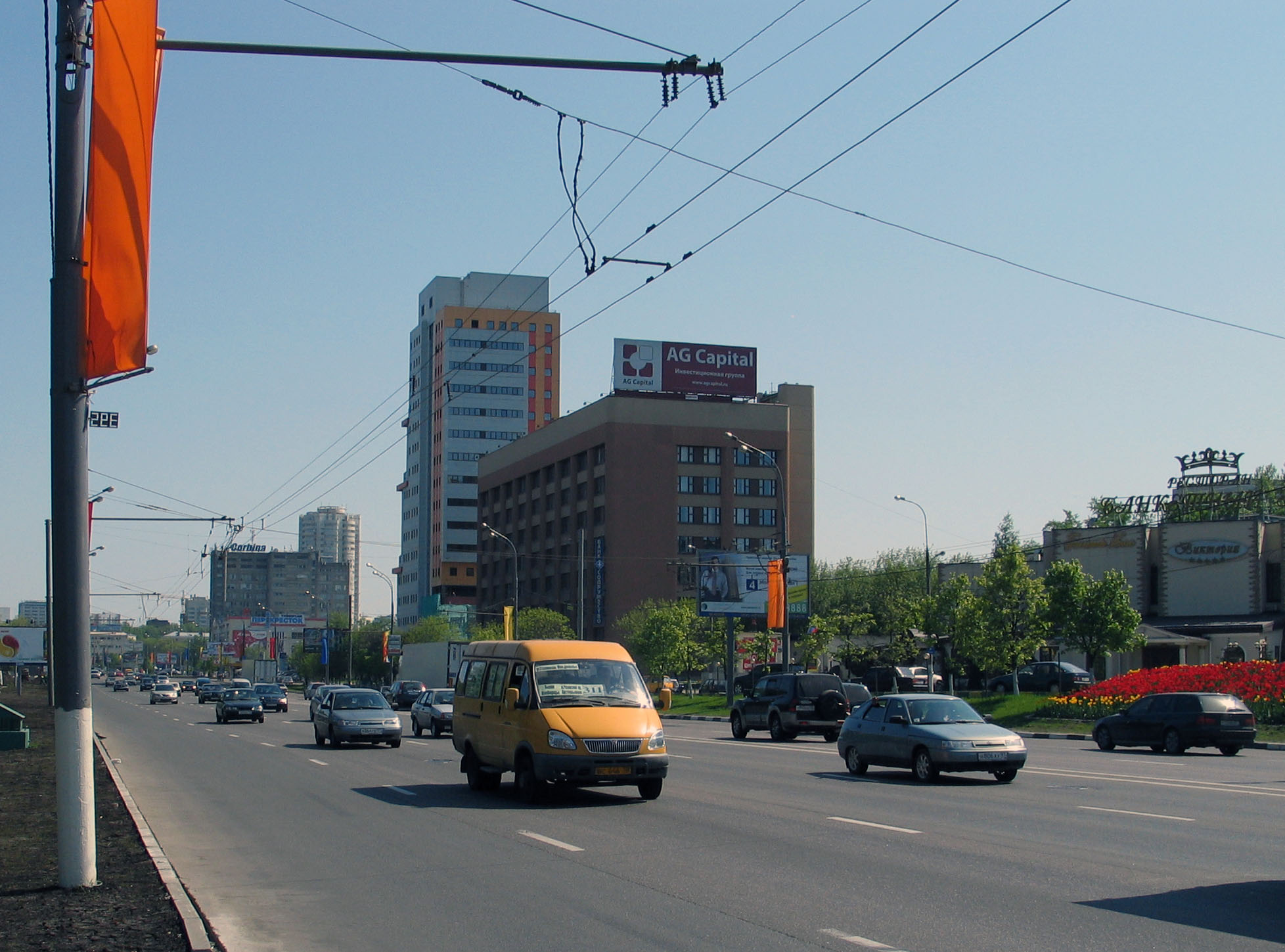 Вид на Рязанский проспект в Москве.